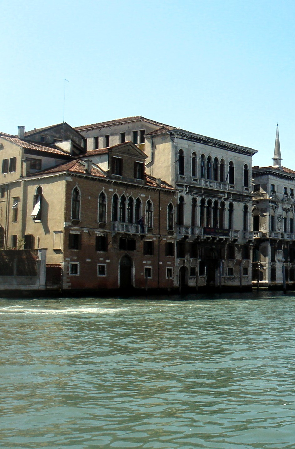 Venezia: Palazzo Duodo e Ca' Tron sul Canal Grande, visti da Cannaregio; sulla destra si vede un pennacchio di Palazzo Belloni Battaglia.